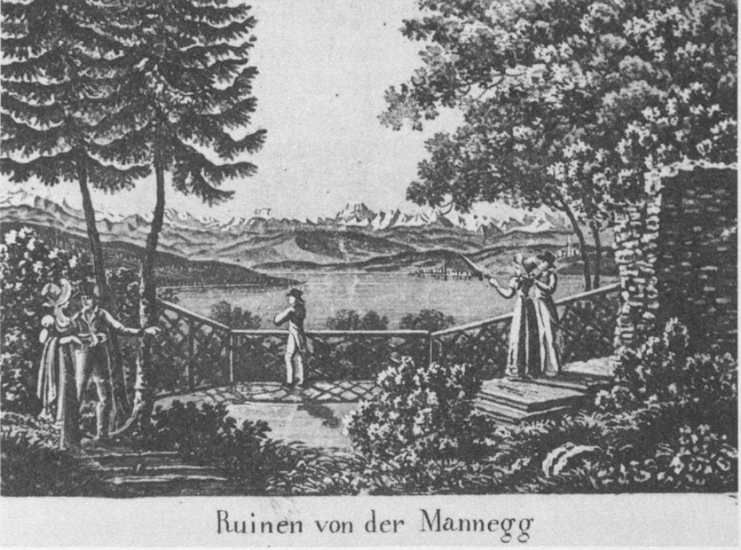 Die Ruine der Burg Manegg, Zürich, Leimbach. Stich Anfang 19. Jahrhunderts. Zentralbibliothek Zürich.